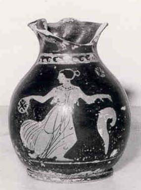 Ceramica peuceta rinvenuta nei pressi di Bitonto e conservata nel museo De Palo-Ungaro. Ceramica ritrovata tra Palombaio e Bitonto.